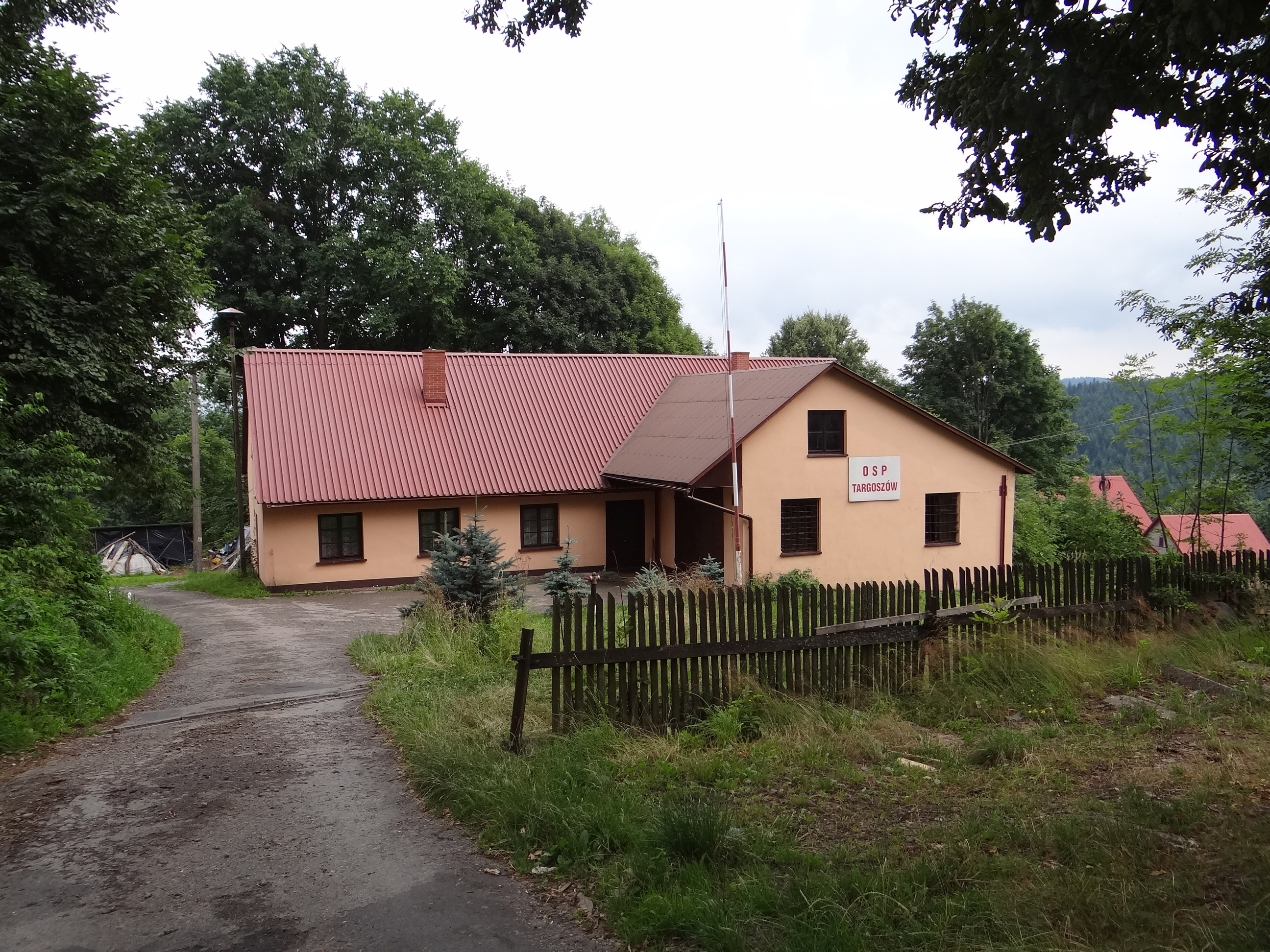 Remiza OSP w Targoszowie